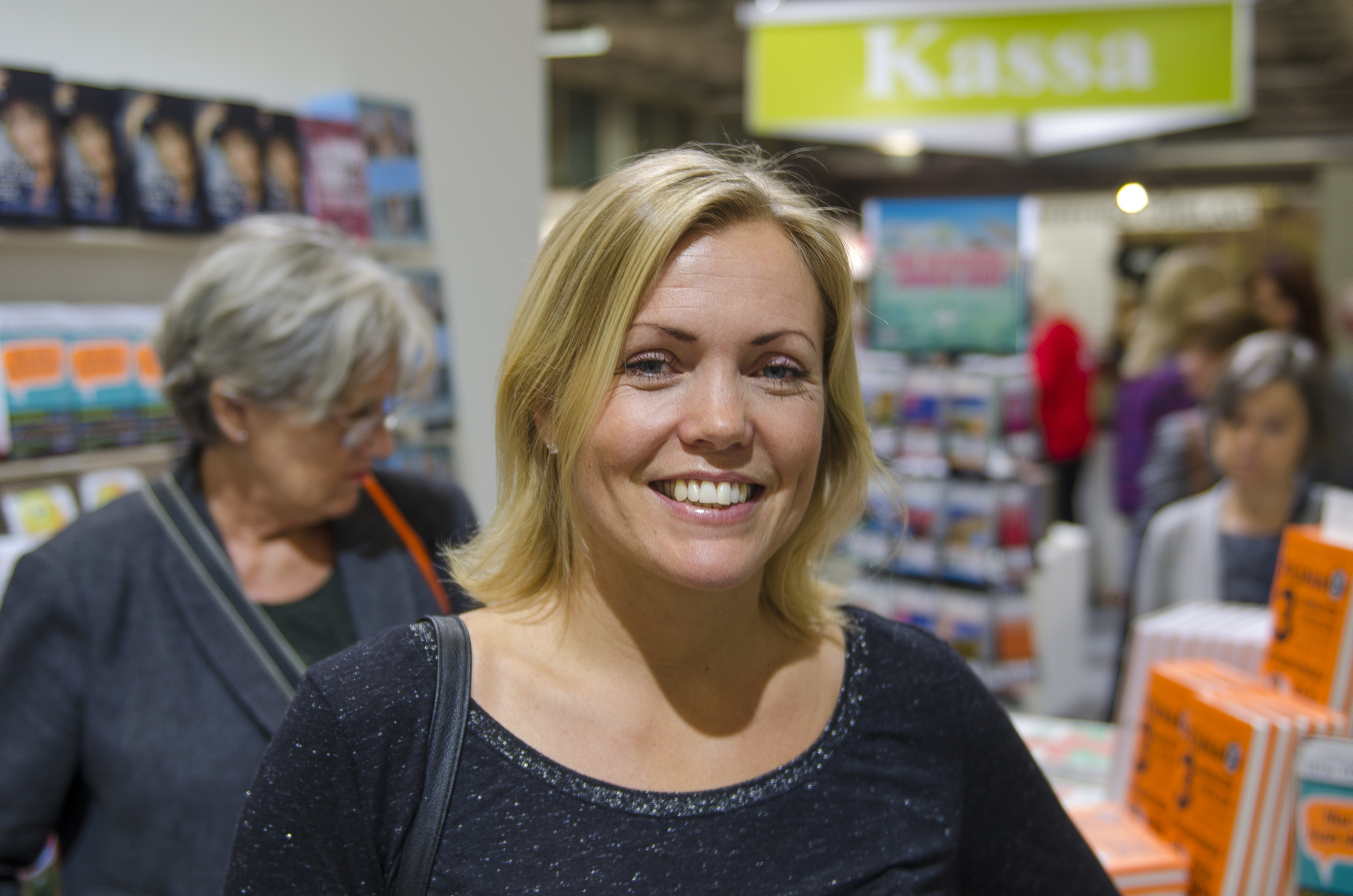 Annika Sjöö på Bokmässan i Göteborg 2014.